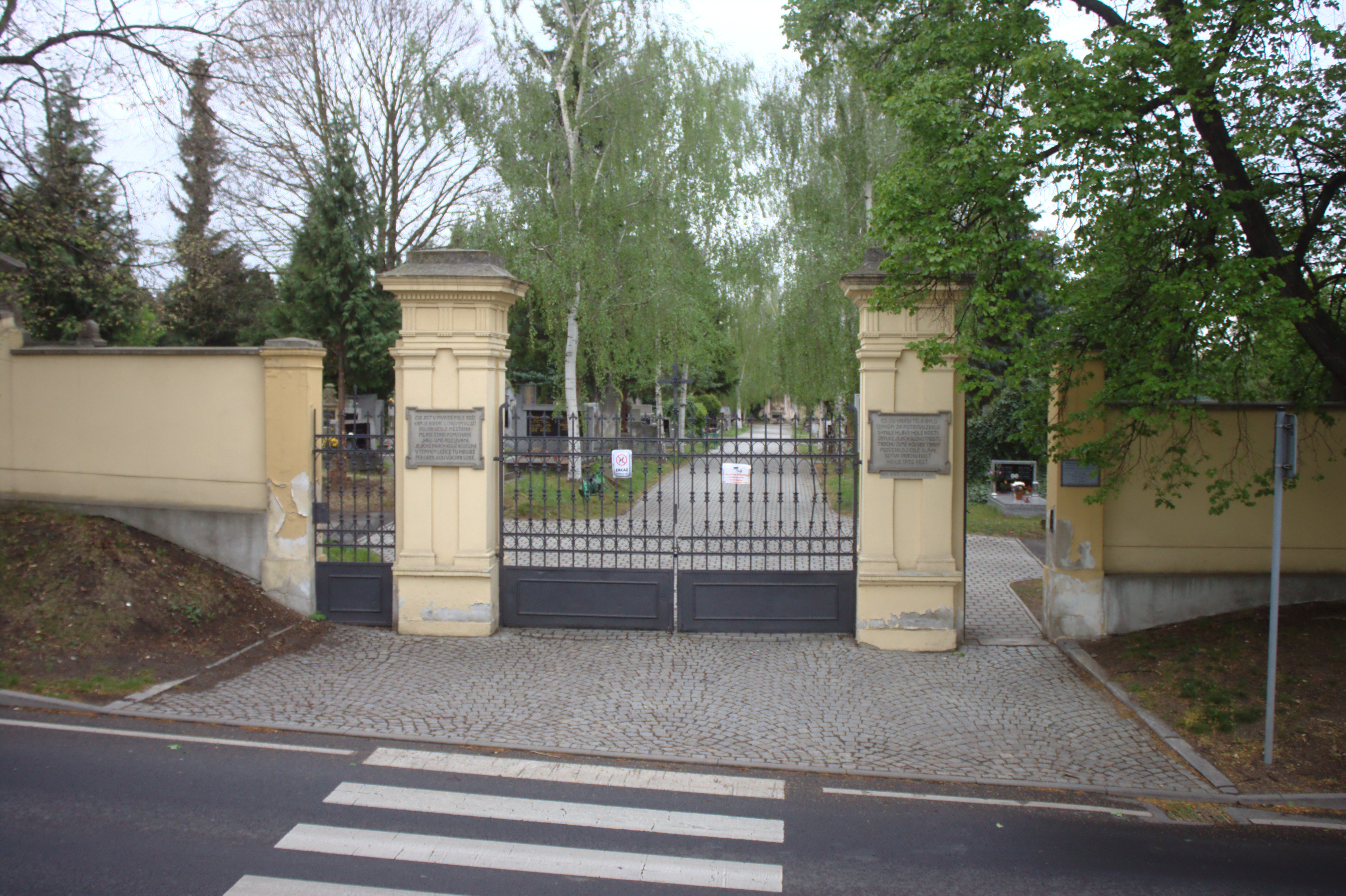 Hřbitov v Rakovnické ulici v Lounech, Ústecký kraj